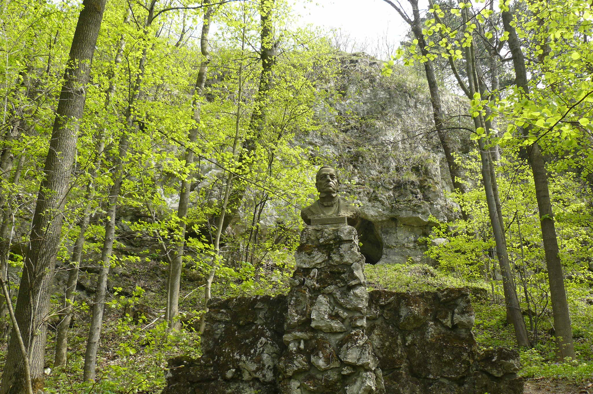 Kotouc - Narodni Sad (Stramberk)